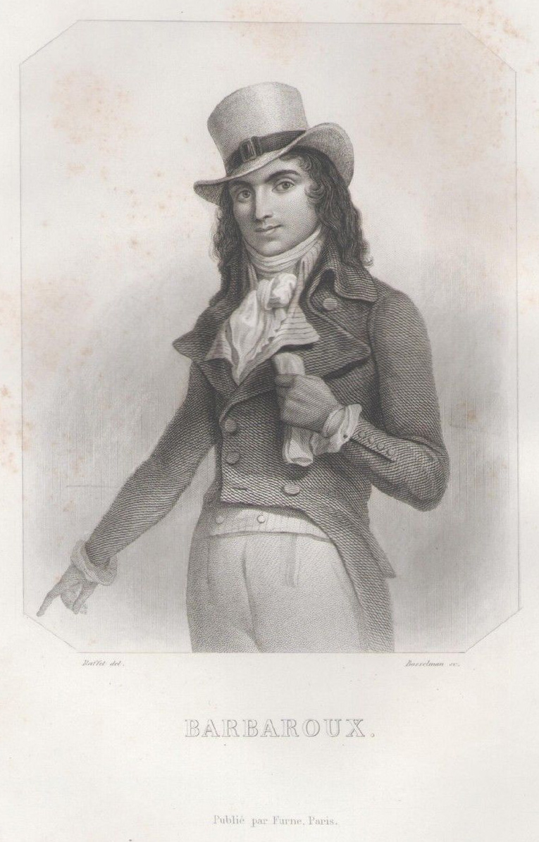 Barbaroux, dessin de Raffet gravé par Bosselman. Illustration extraite de Histoire des Girondins de Lamartine, Paris, Furne et Cie-W.Coquebert, 1847.